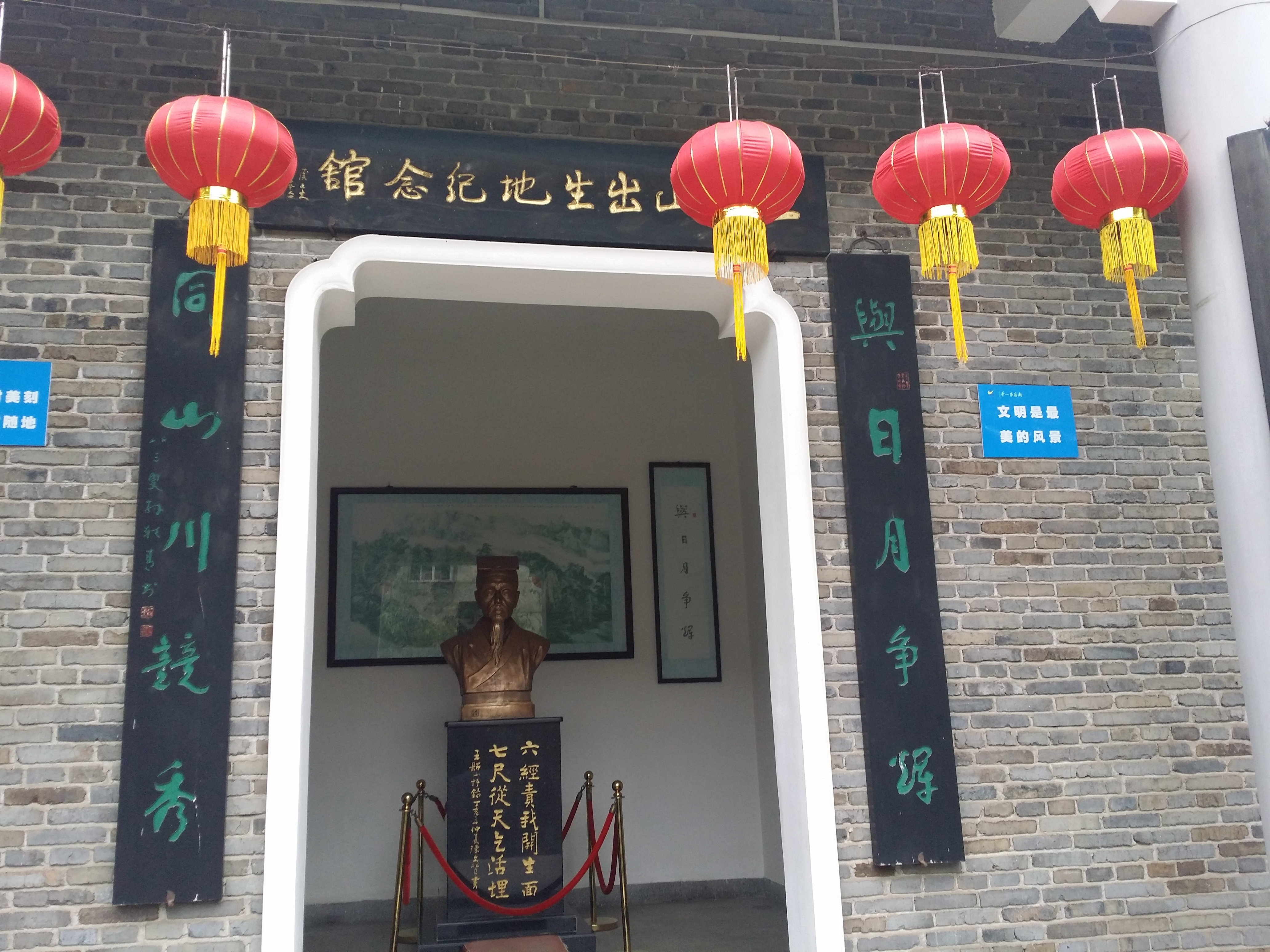 中文（中国大陆）: 王船山出生地纪念馆的正门